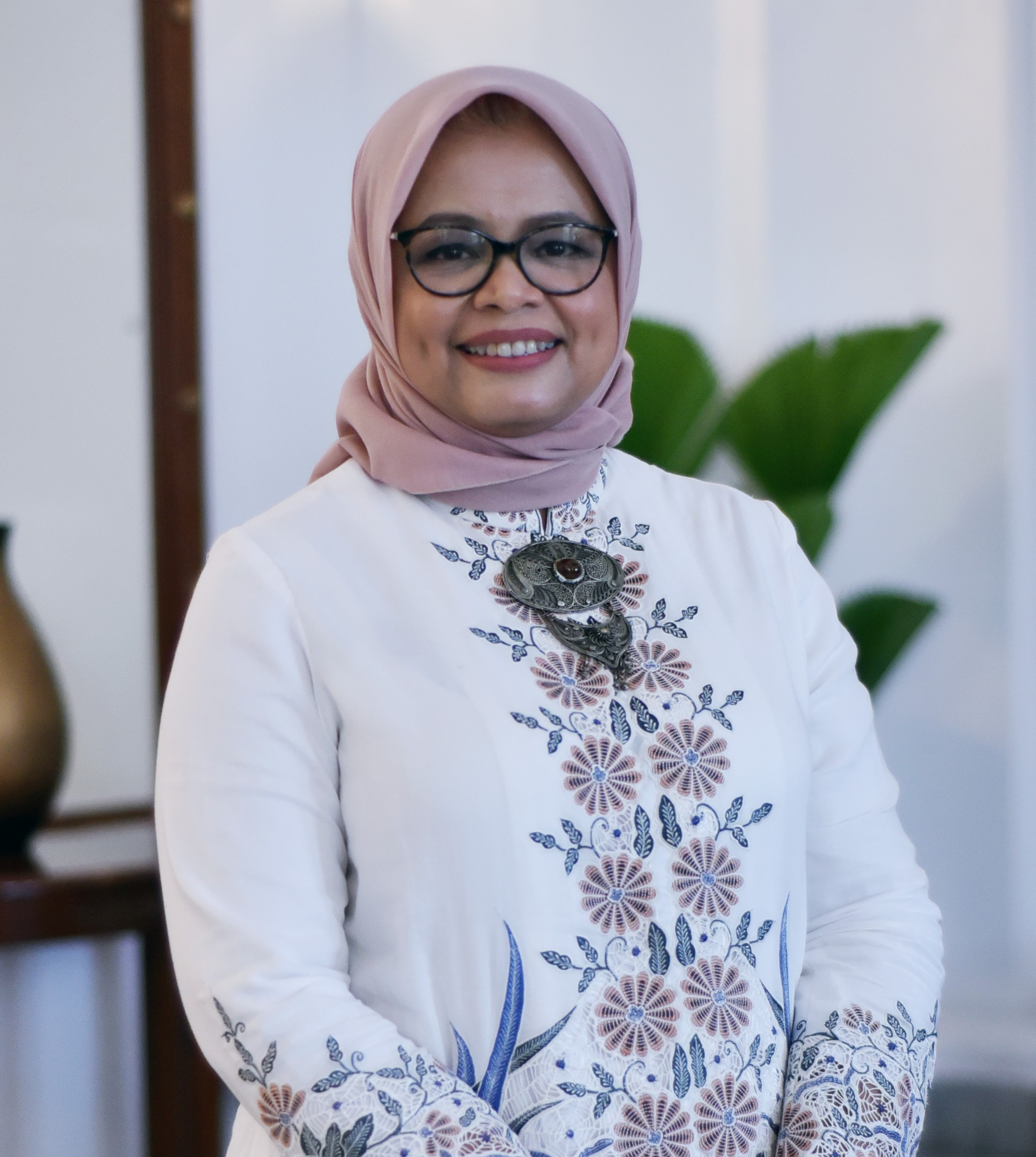 Fery Farhati